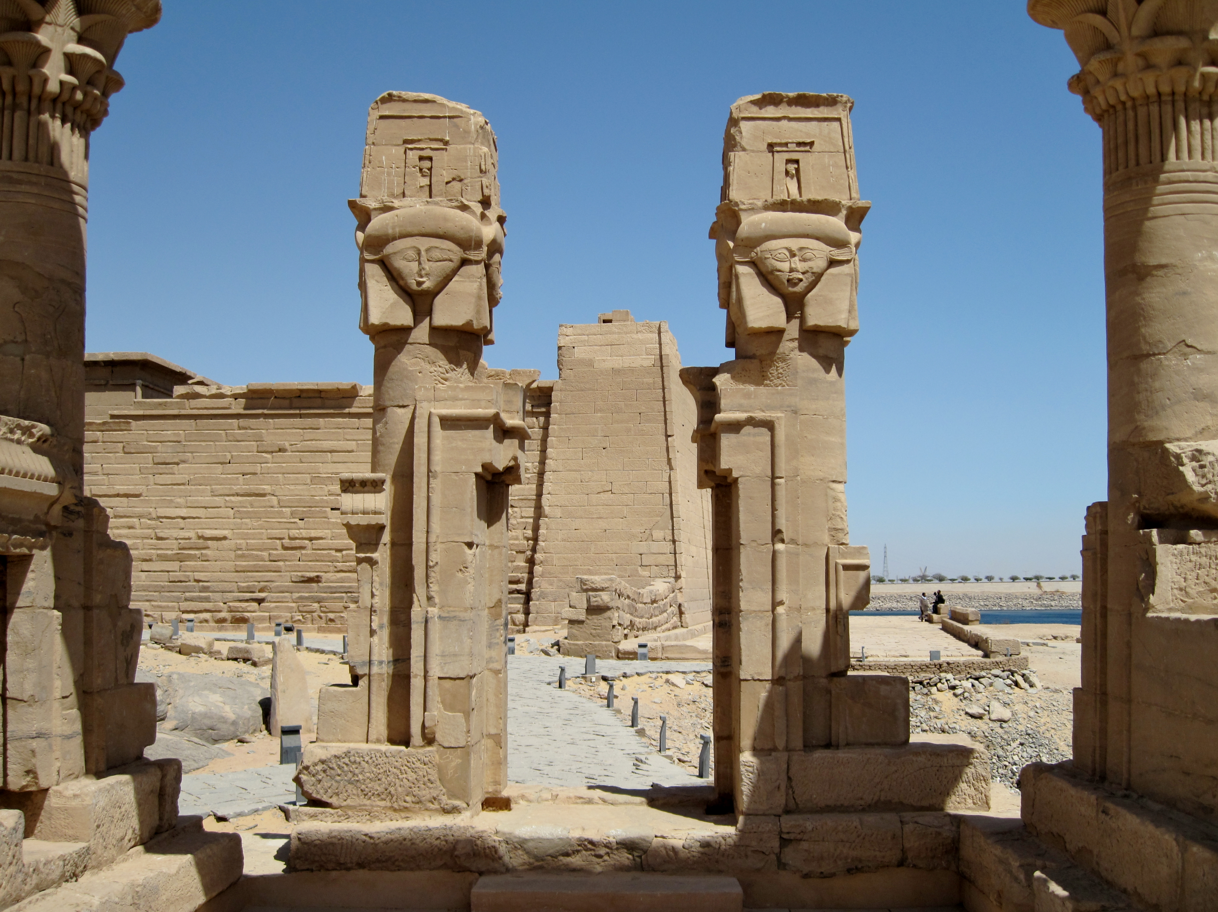 Der Kiosk von Kertassi nahe dem Assuan-Hochdamm, Ägypten